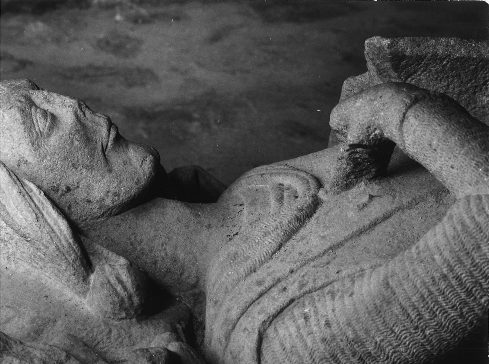 Gisant de Rolland de Dinan, conservé au musée de Dinan